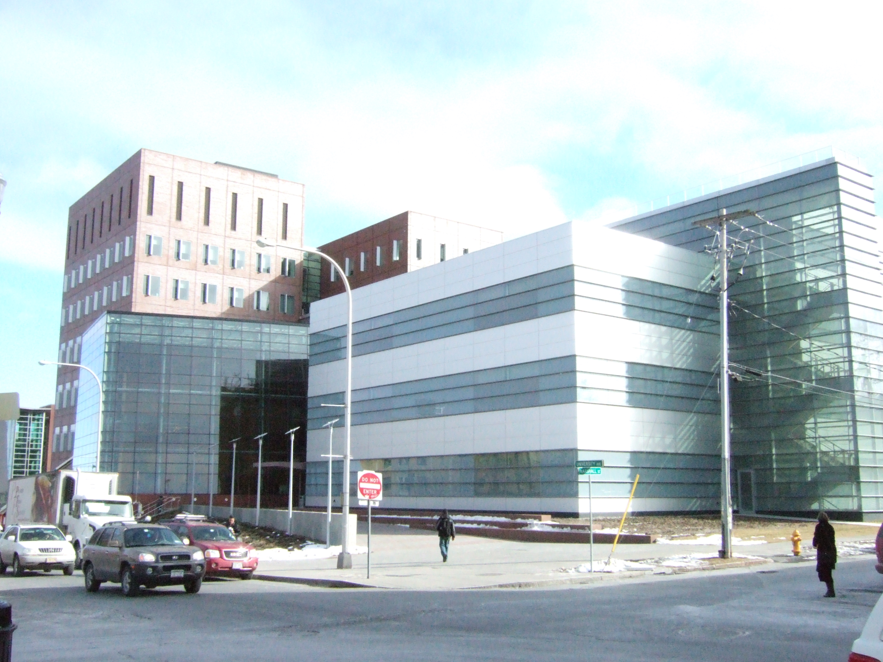 03/07/06 taken by Kisstory